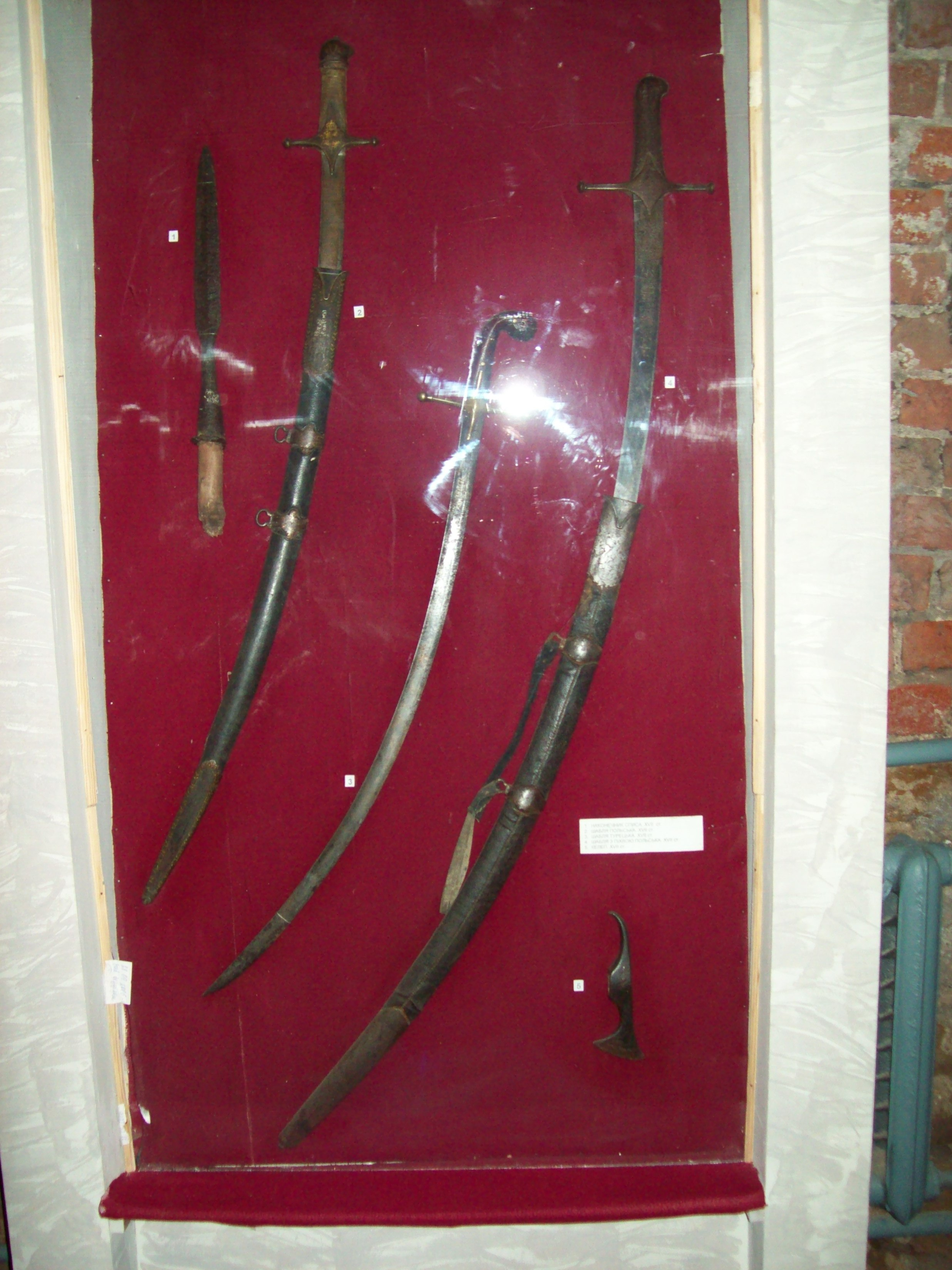 Знято фотоапаратом Кодак